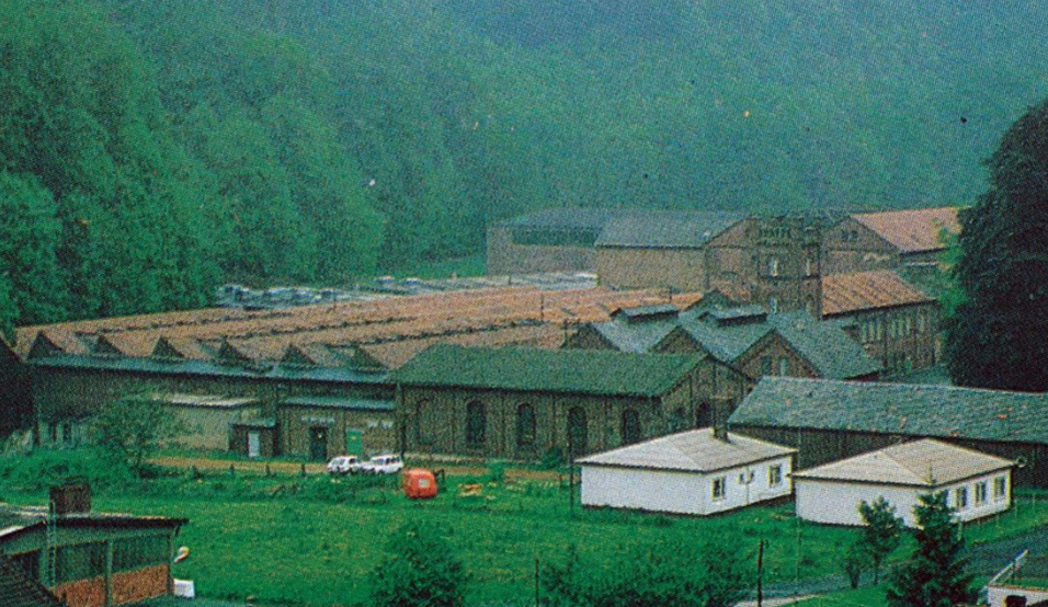 Multibeton-Werk Bergisch Gladbach, Lochermühle, 1970er Jahre